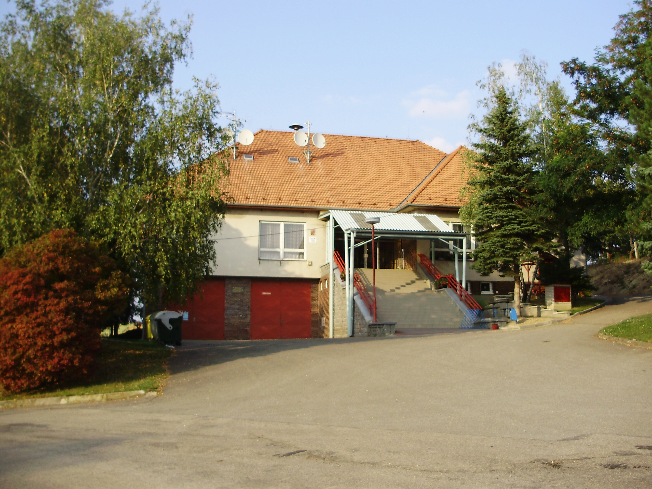 Obecní úřad Kojátky (Vyškov-(Bučovice)- Czech republic)